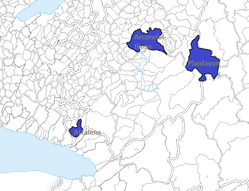 Carte des seigneuries de la famille de la Baume qui se situent sur le territoire suisse actuel